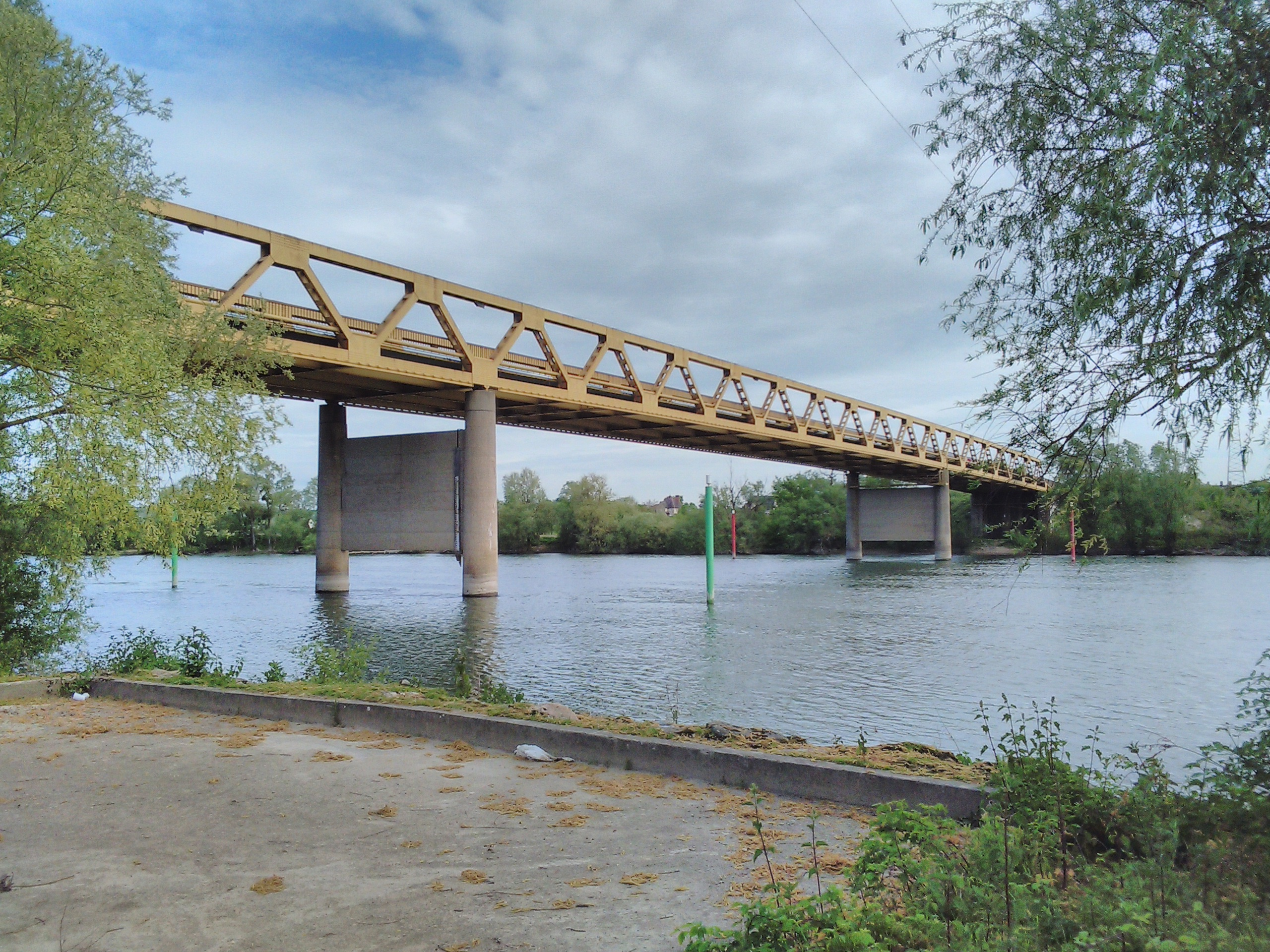 Pont-route métallique sur la Seine - vue prise de la rive gauche albavienne, sur le chemin de halage